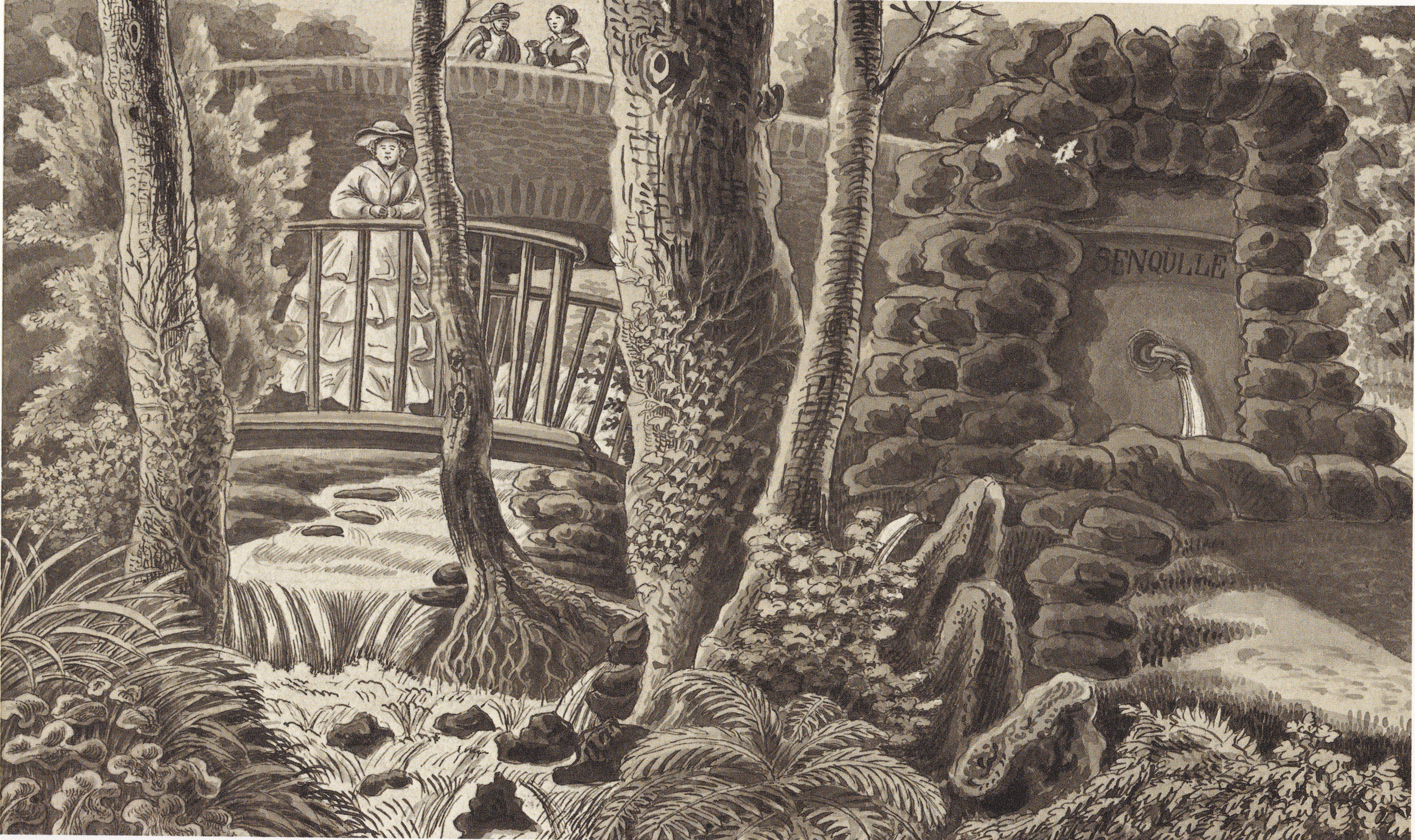 Die Luisenquelle im ehemaligen Klosterpark von Marienberg in Boppard